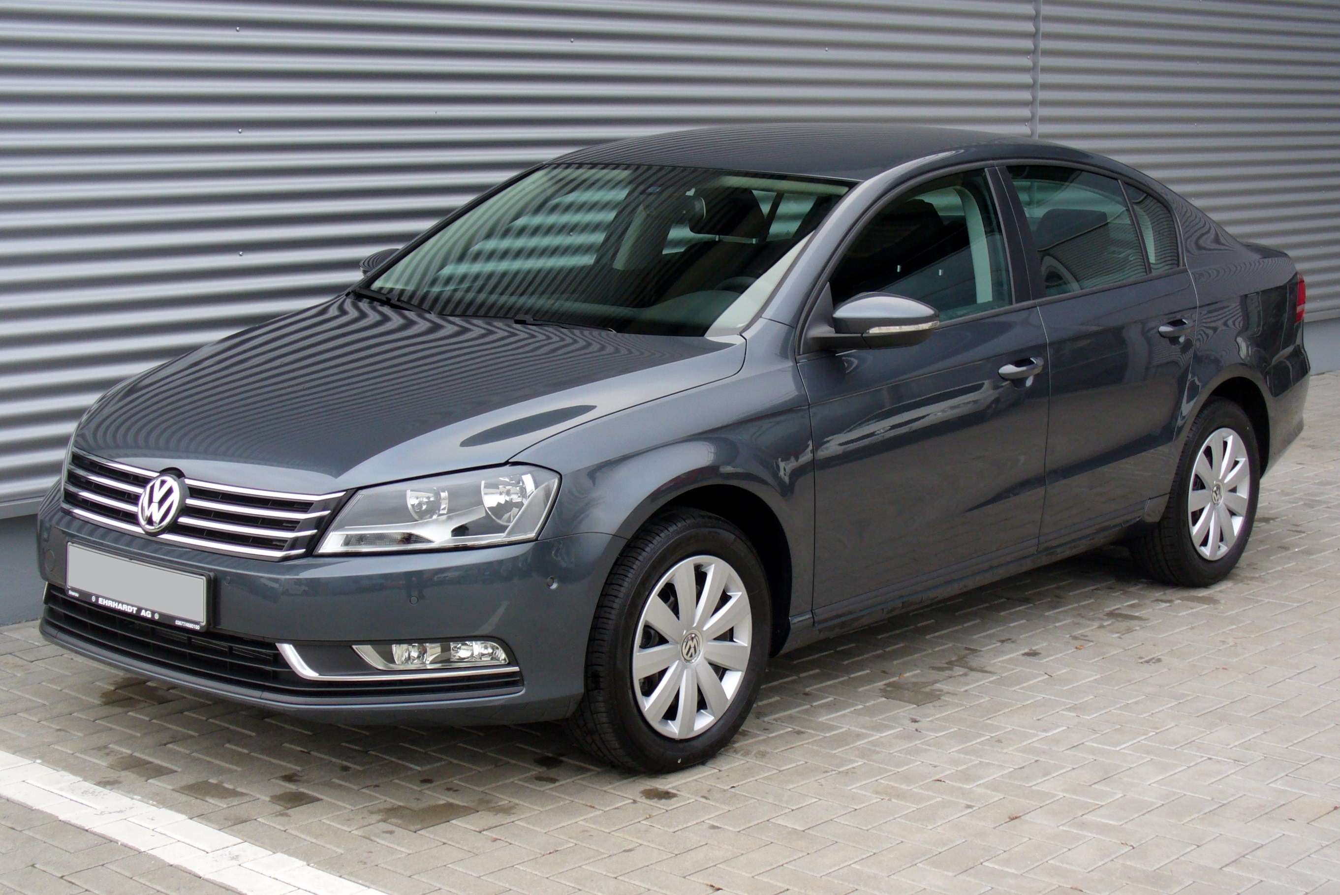 VW Passat B7